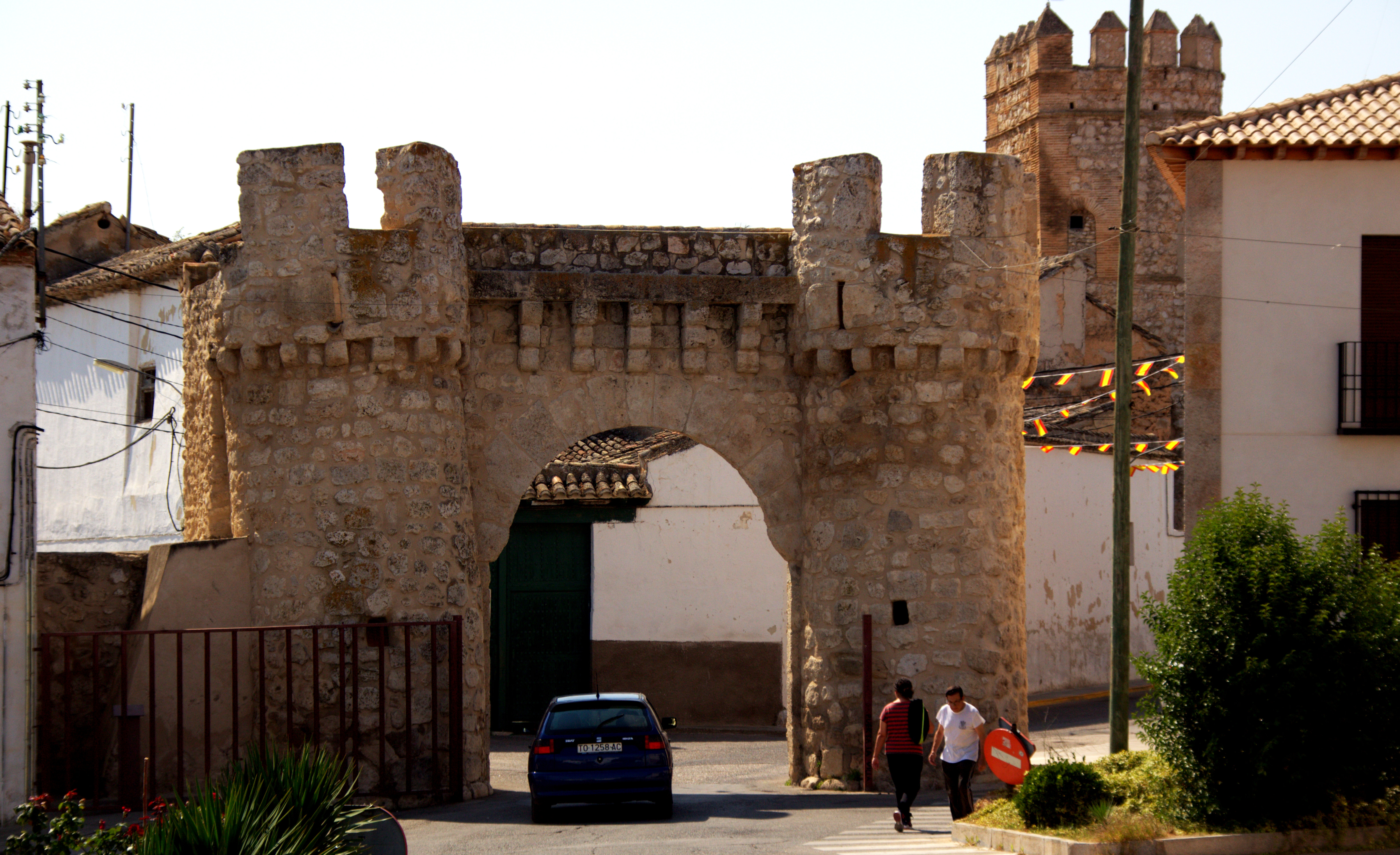 Yepes, provincia de Toledo (España).